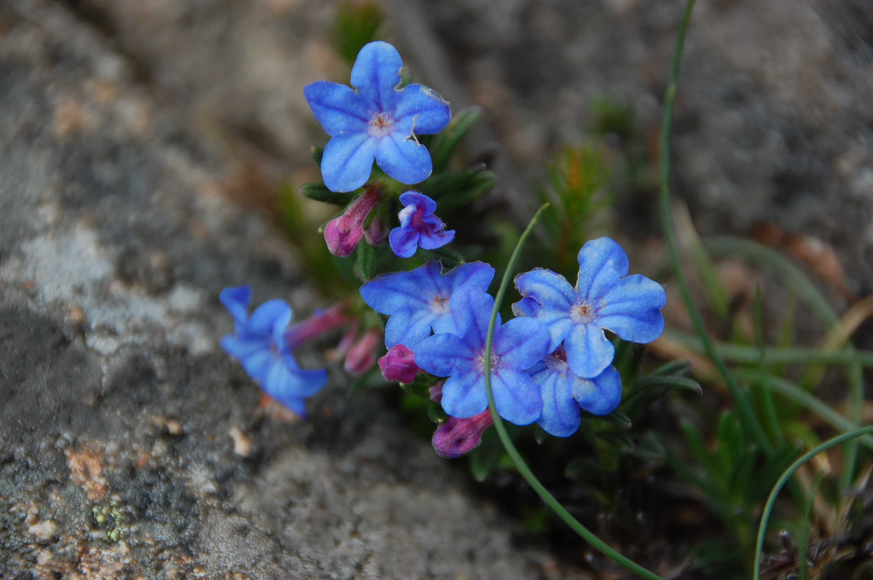 Carrasquillas o Lithodora prostrata. Encontradas en el monte Pindo, en la Costa de la Muerte de Coruña muy cerca de Fisterra.